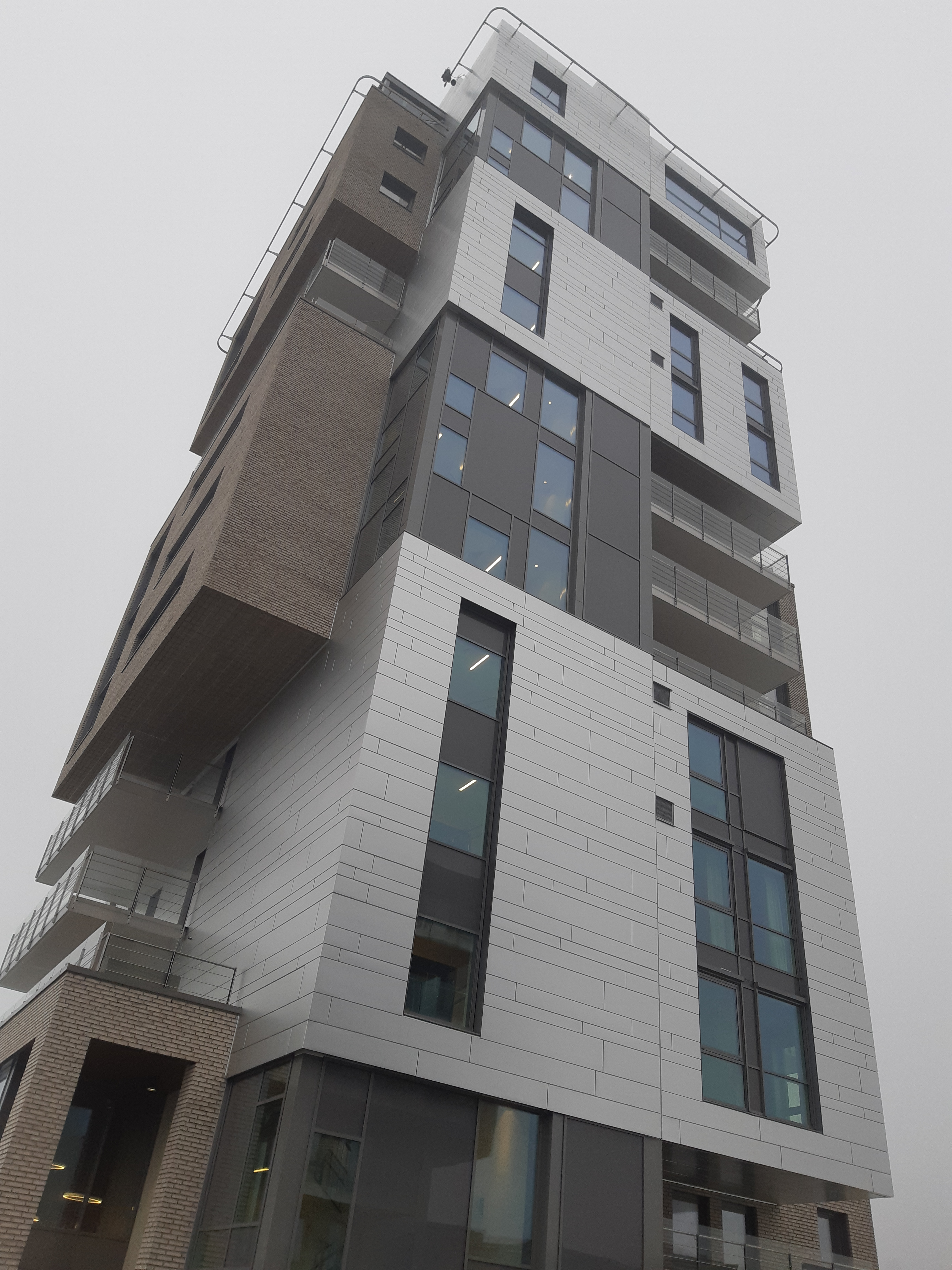 Det vakre Signaturbygget på Kaldnes i Tønsberg.